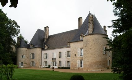 Église Saint-Pierre-Saint-Paul de Neuilly-sur-Suize